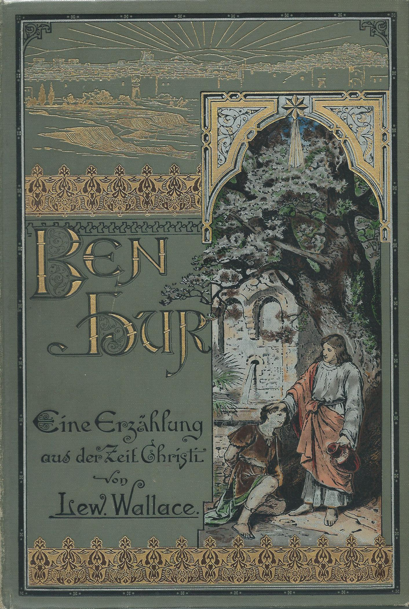 Lew Wallace: Ben Hur c. régénye Deutsche Verlags-Anstalt általi német kiadásának borítója